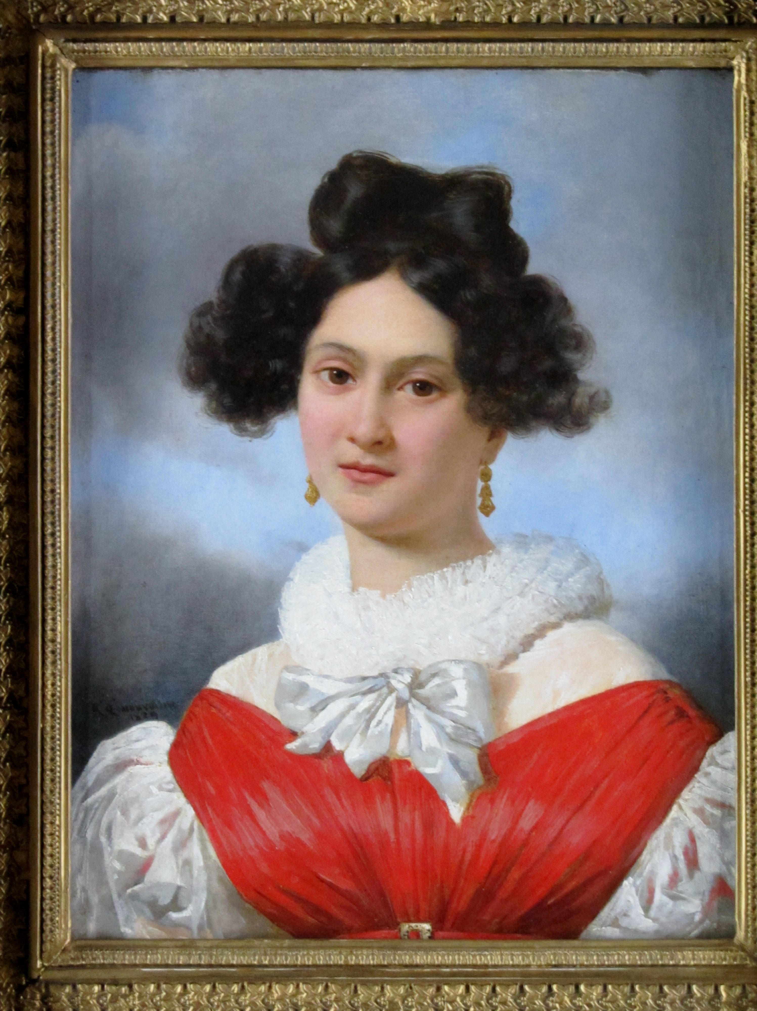 Retrato de su esposa Domenica Festa (1805/7- 1881), hija menor del pintor Felice Festa (n. 1763/4), acuarelista y pintora miniaturista que expuso en los Salones de París; en Francia era conocida como Dominique Monvoisin o simplemente Madame Monvoisin. El pintor bordelés la conoció en Roma, donde estaba becado, y se casaron en la iglesia de San Luis de los Franceses el cinco de marzo de 1825, al final de la estadía de Monvoisin en la Ciudad Eterna. Tuvieron una hija, Blanche (Bianca, Blanca), pero el matrimonio sufrió por desaveniencias y Festa no lo acompañó a sus viajes por América del Sur.